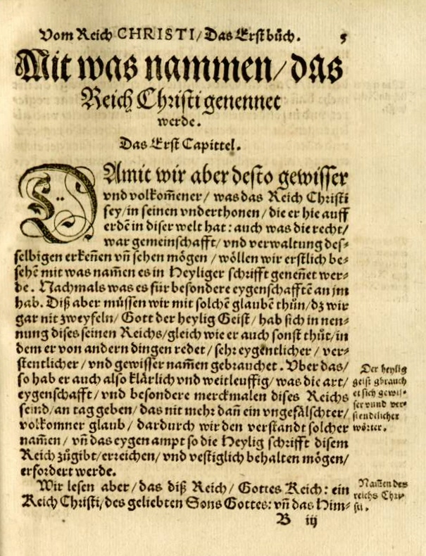 Martin Bucer, De regno Christi, Buch I, Kap. 1, S. 1